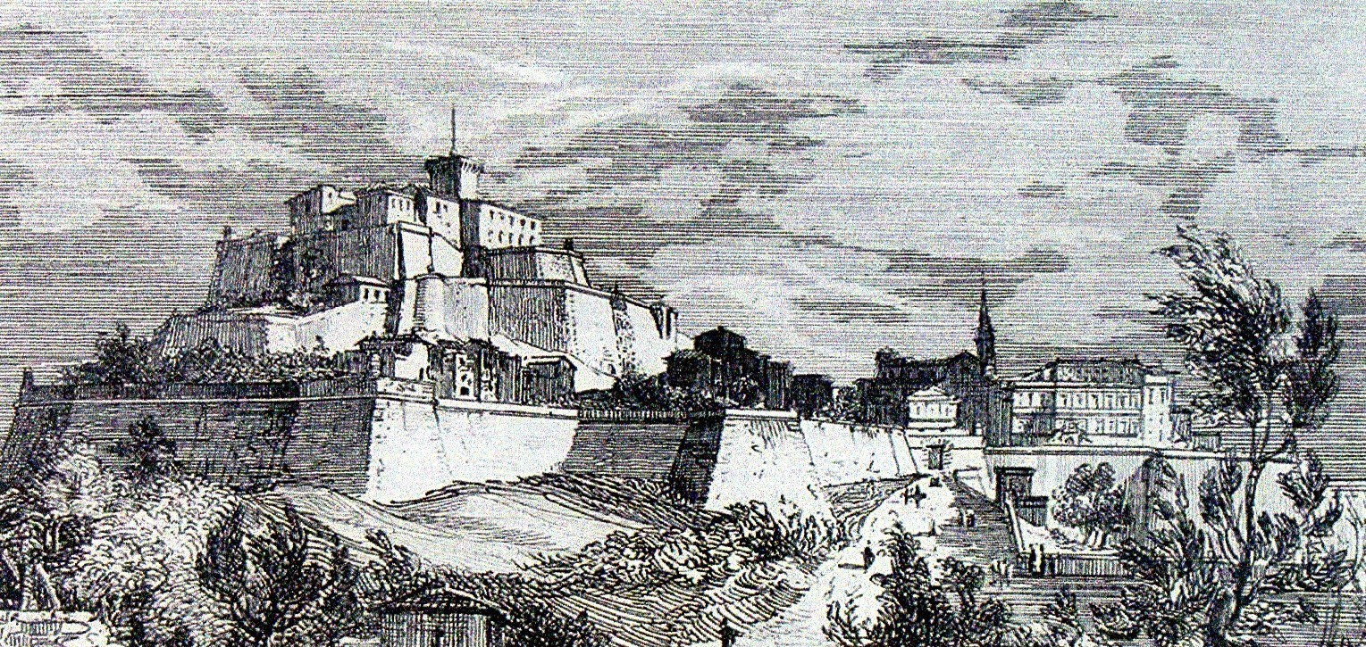 Castello-rocca di Paliano (Lazio)